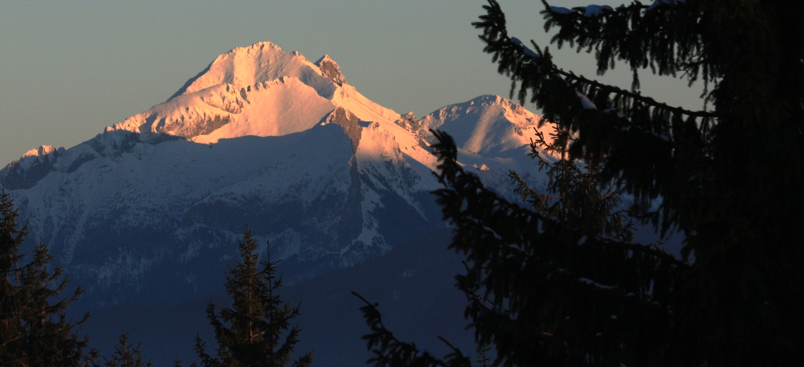 Gubałówka :)